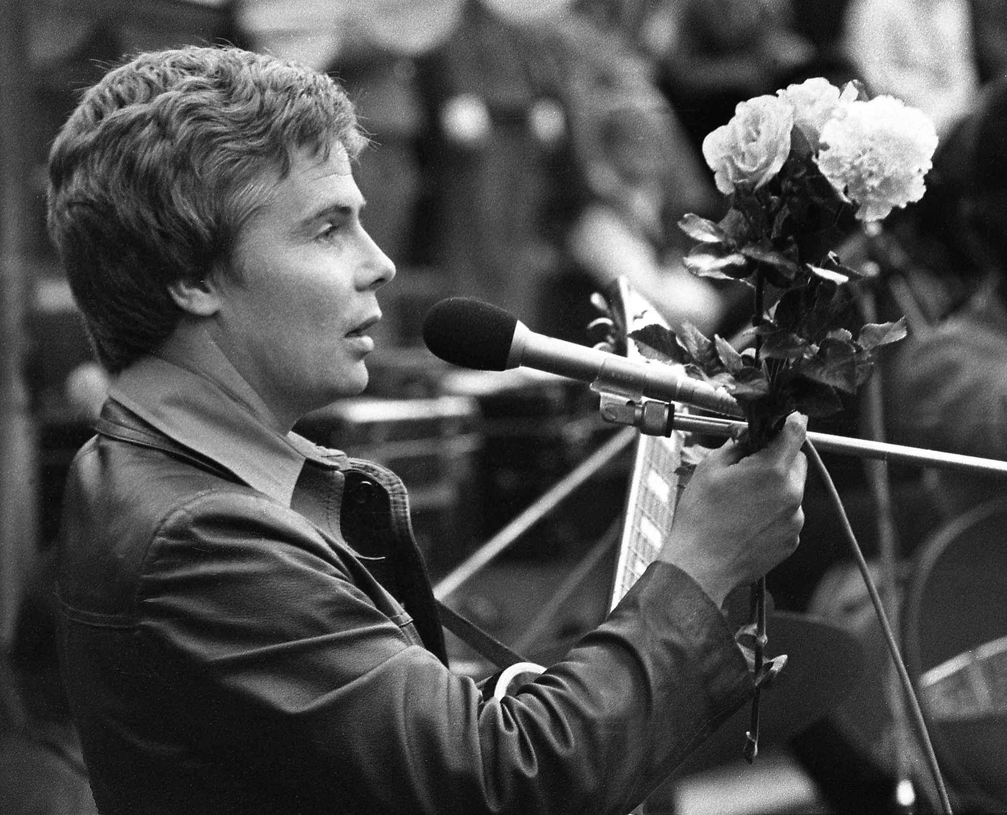 Vello Jurtom, Palderjan (ansambel) 1978